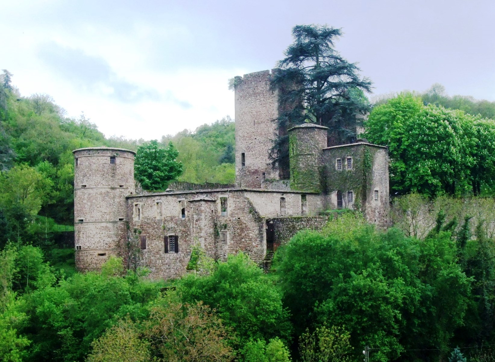 Thorrenc castle